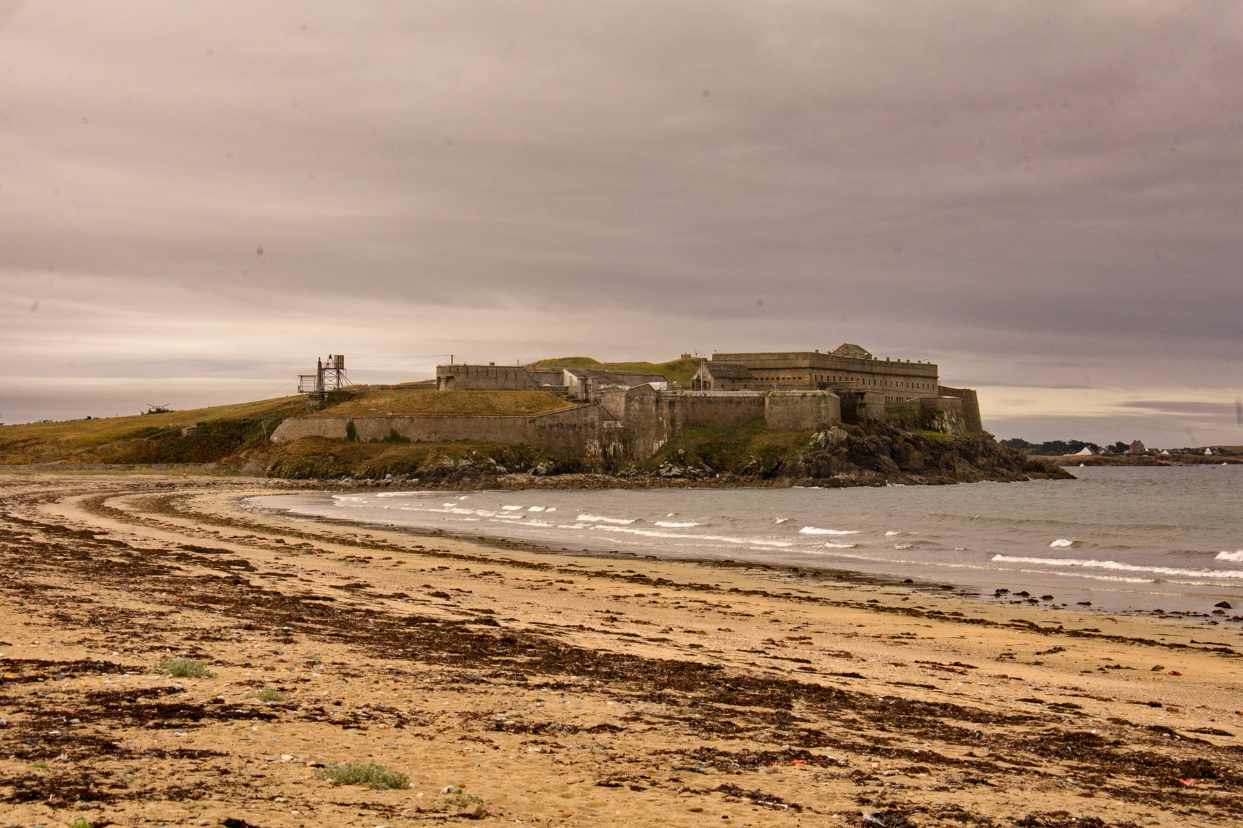 Fort de Penthièvre (Inscrit) .